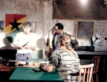 שלח מביים את פיטר פונדה צילום דויד גור